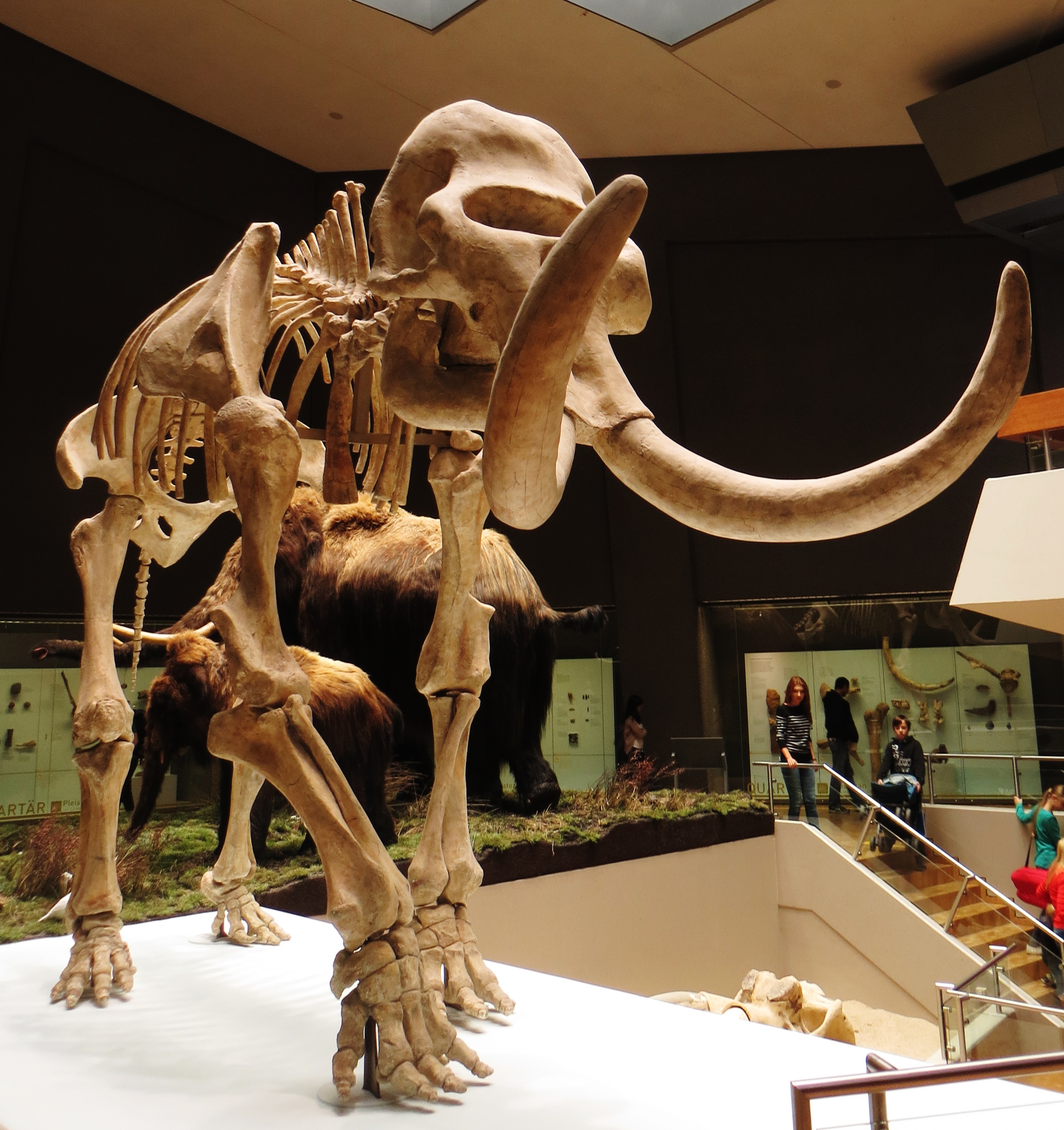 Fossil of Mammuthus- Took the picture at Museum am Lowentor, Stuttgart